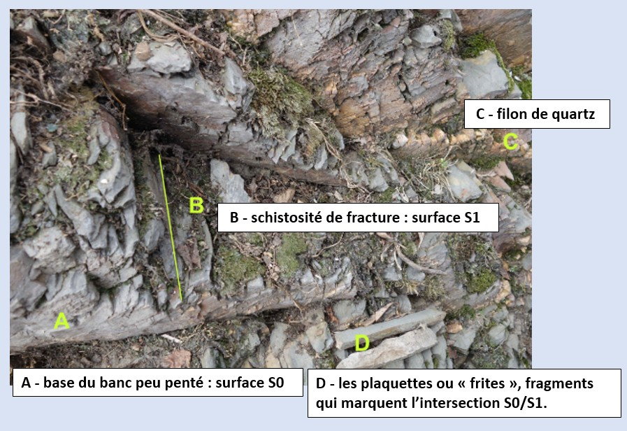 Dalles de Néant : formation briovérienne affleurant à Campénéac, France.